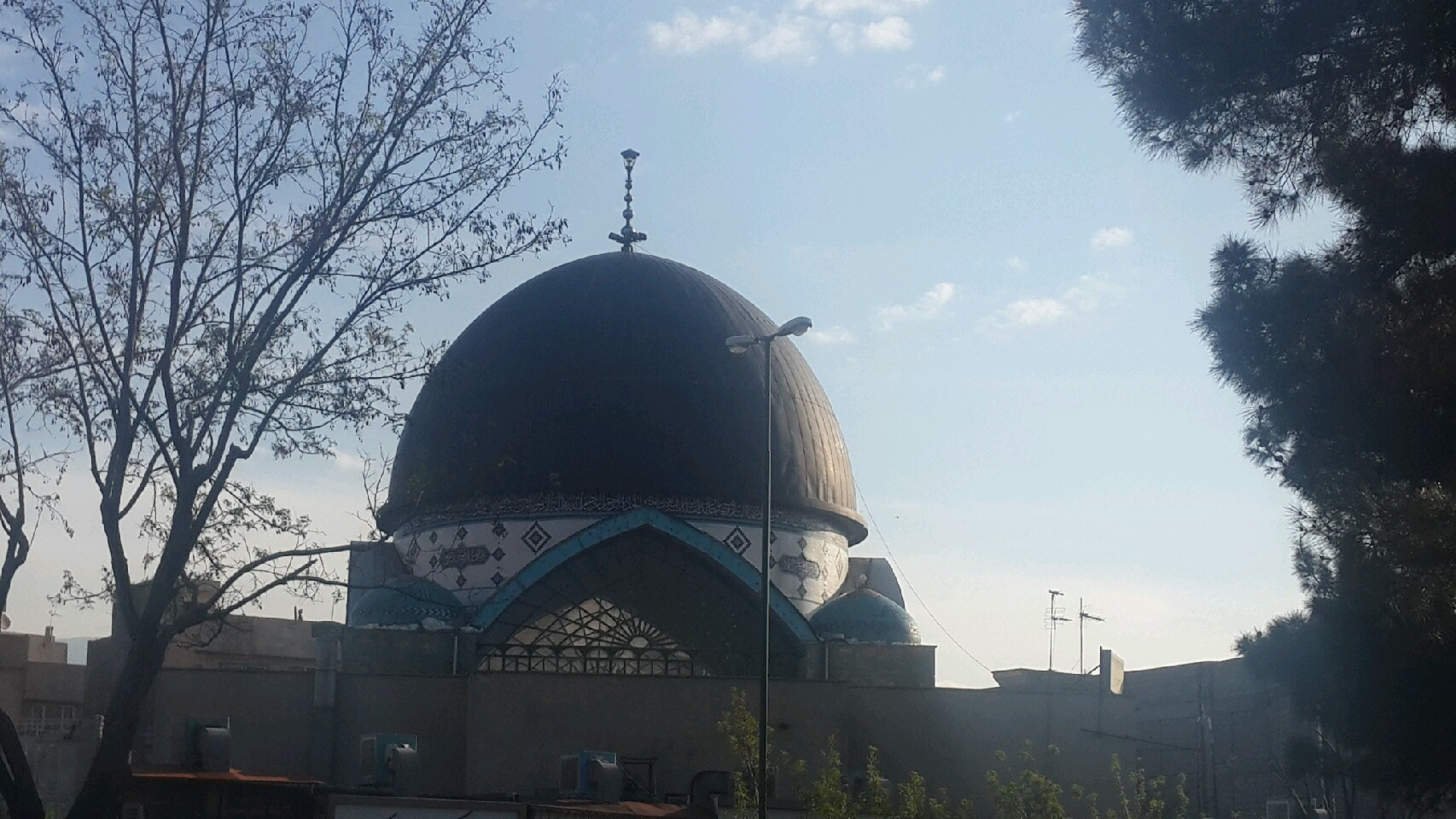 عکس سجد شهرک آزادی از کنار بوستان مریم و روبروی مرکز بهداشت گرفته شده